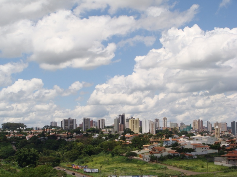 Vista da cidade de São Carlos, em São Paulo.